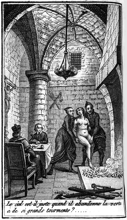 Tome 3. Sixième partie. Page 459 : Castellina torturée, soumise à la question. "Le ciel est-il juste quand il abandonne la vertu à de si grands tourments ?"